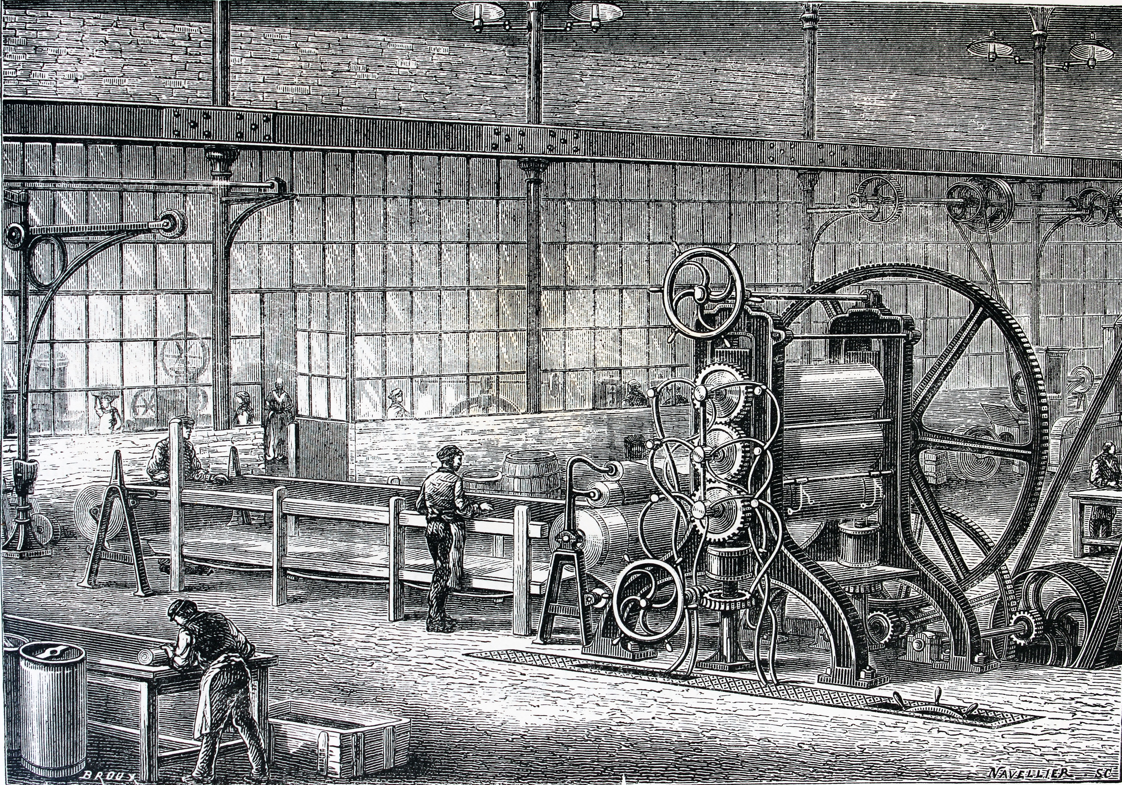 Ilustraciones de la obra : Les merveilles de l'industrie ou, Description des principales industries modernes / par Louis Figuier. - Paris : Furne, Jouvet, [1873-1877]. - Tome II